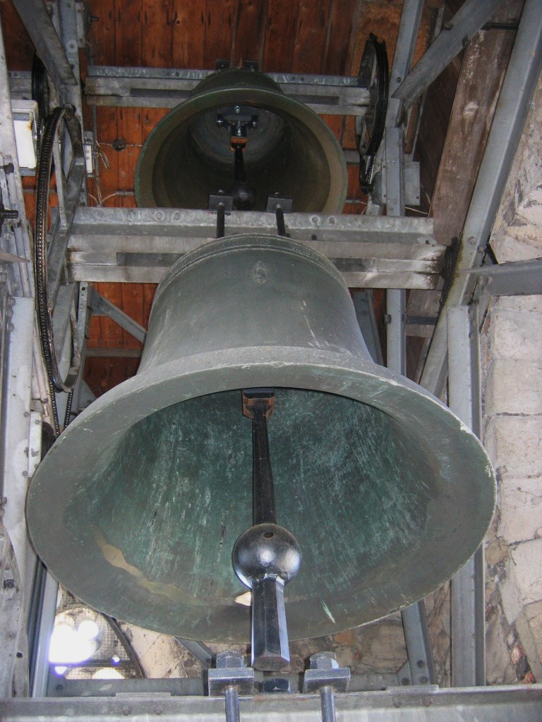 Historische Glocke 3 in St. Johann zu Rapperswil